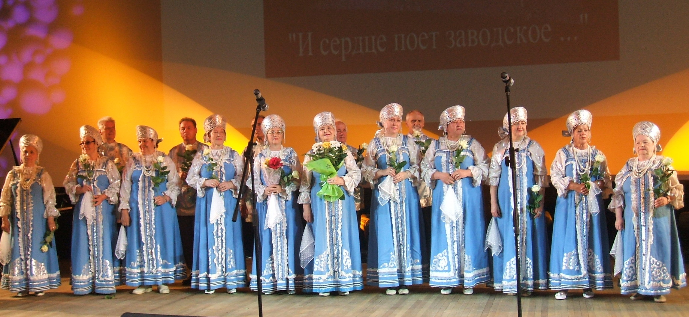 Сестрорецк СПб Хор Русская песня СИЗ